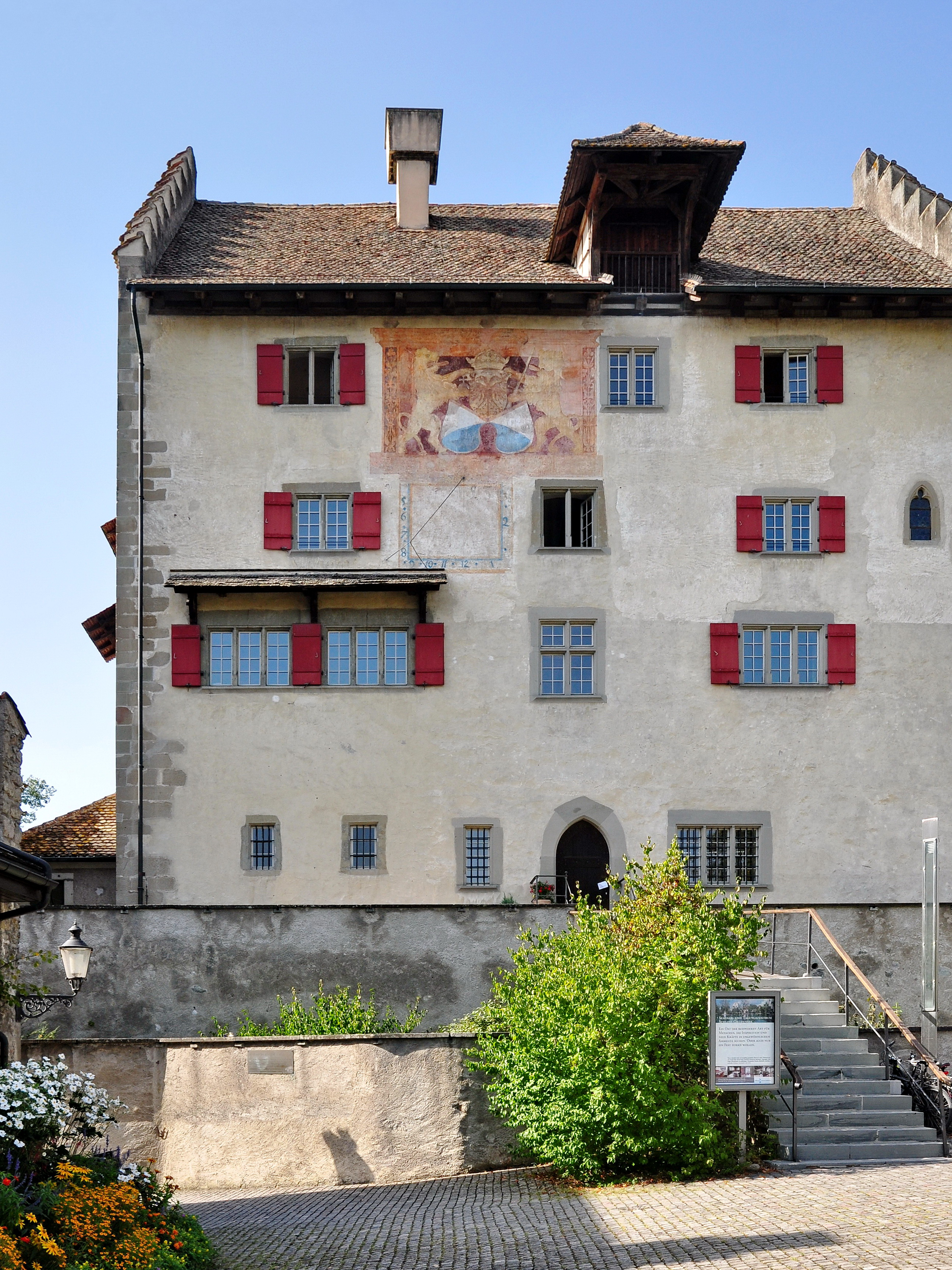 Schloss in Greifensee (Switzerland)